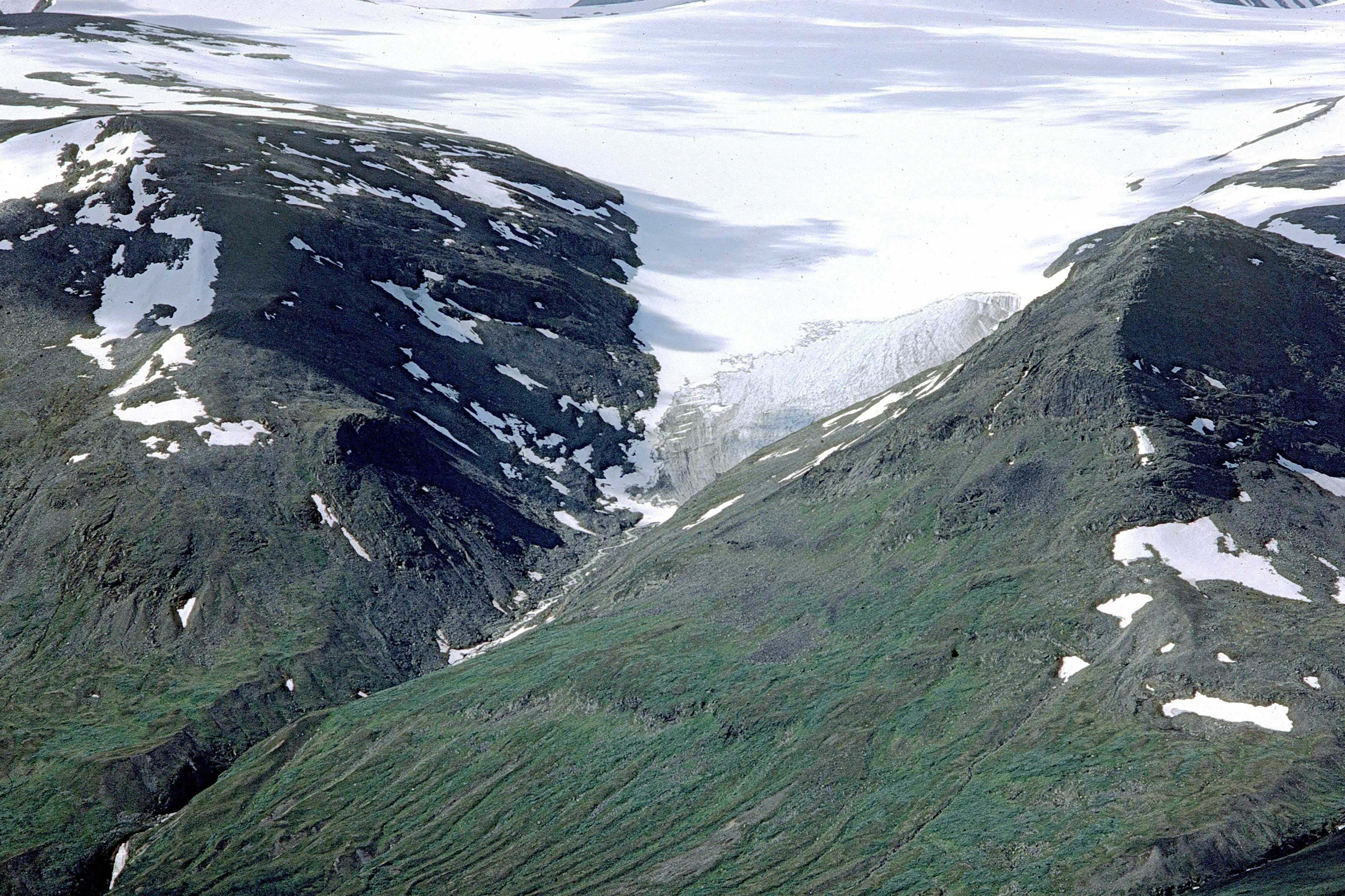 Glaciären Jåkåtjkaskajekna